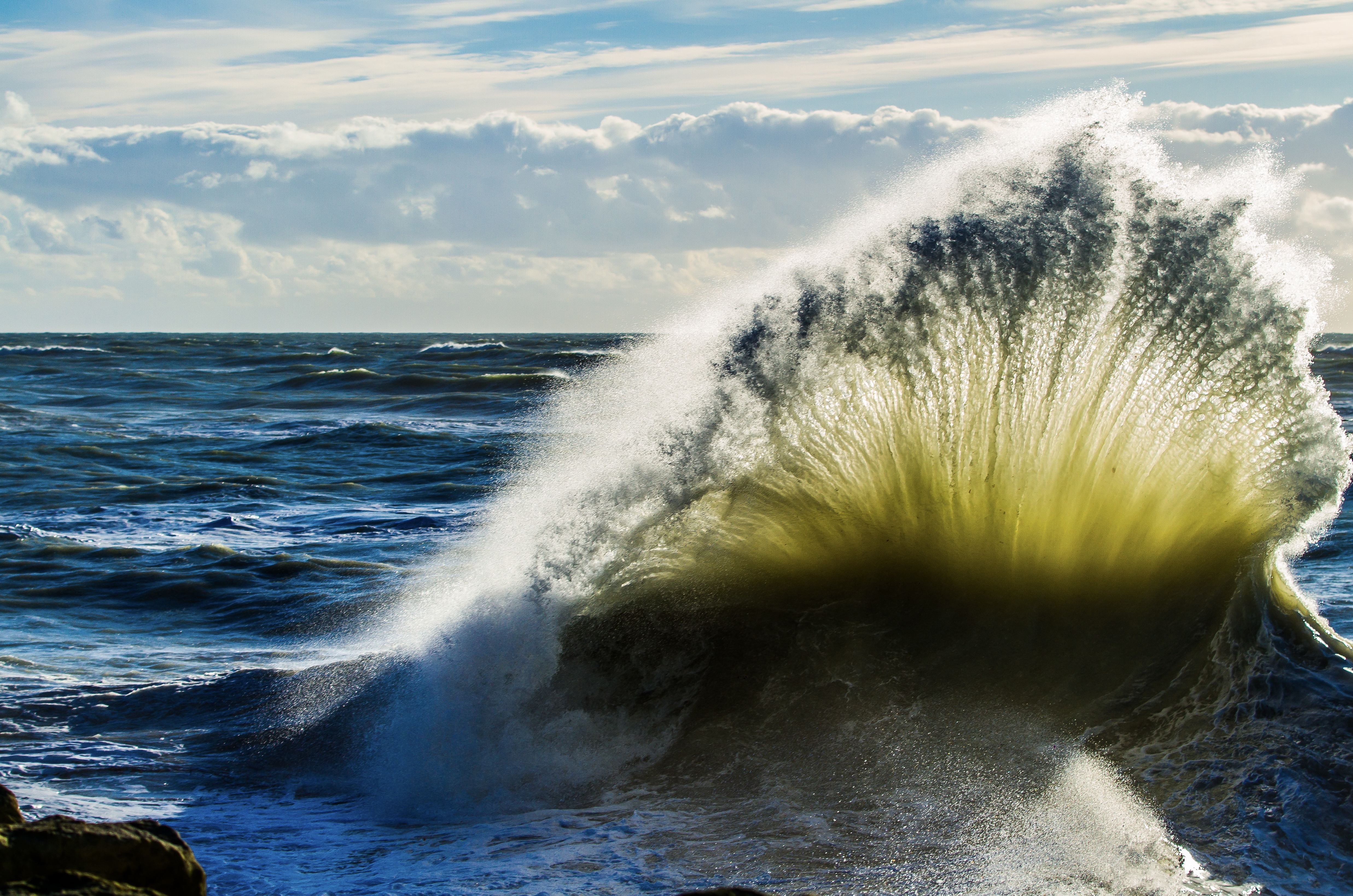 Une vague sur les rochers de St Cléments Des Baleines, Ile De Ré